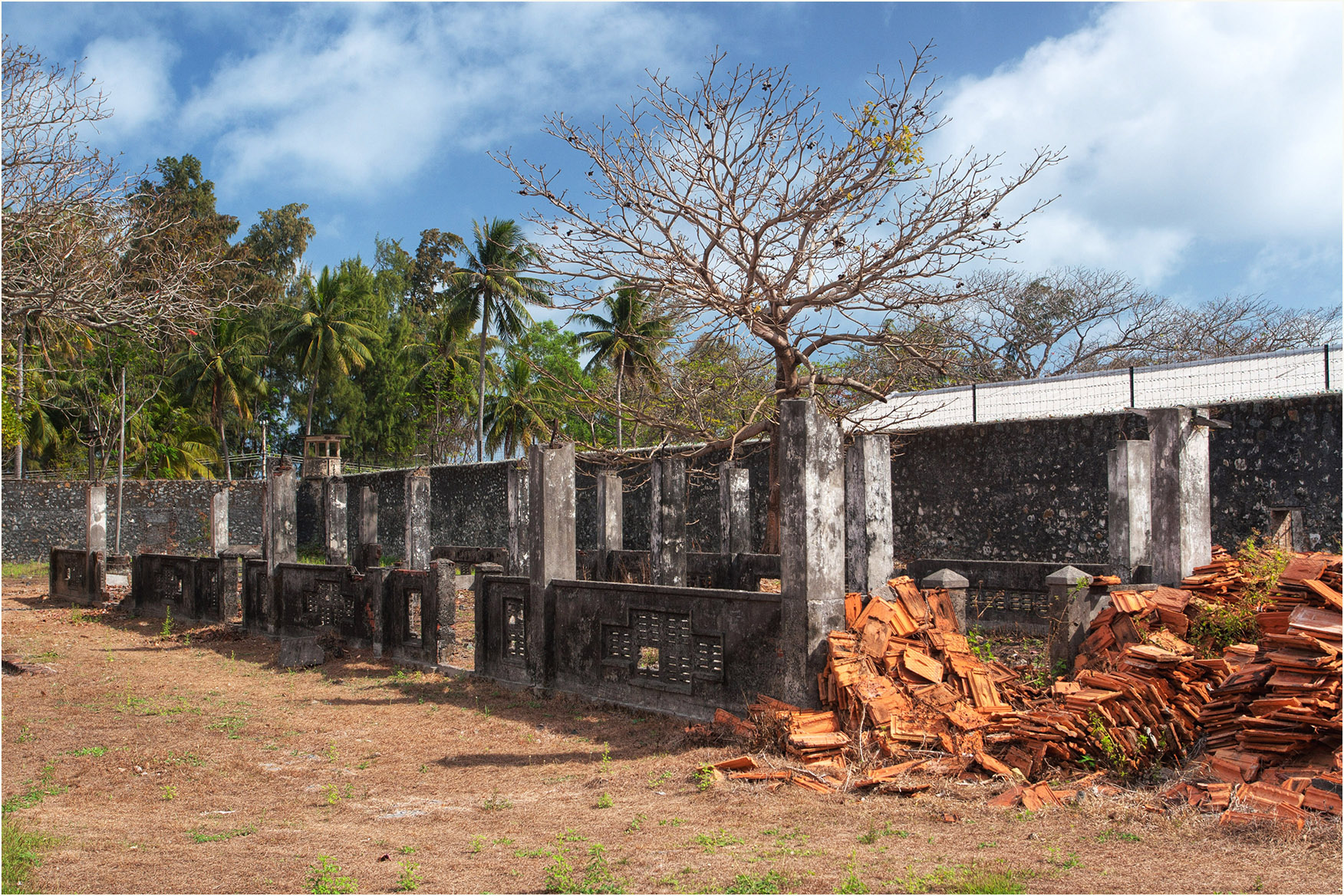 Trại Phú Tường Côn Đảo